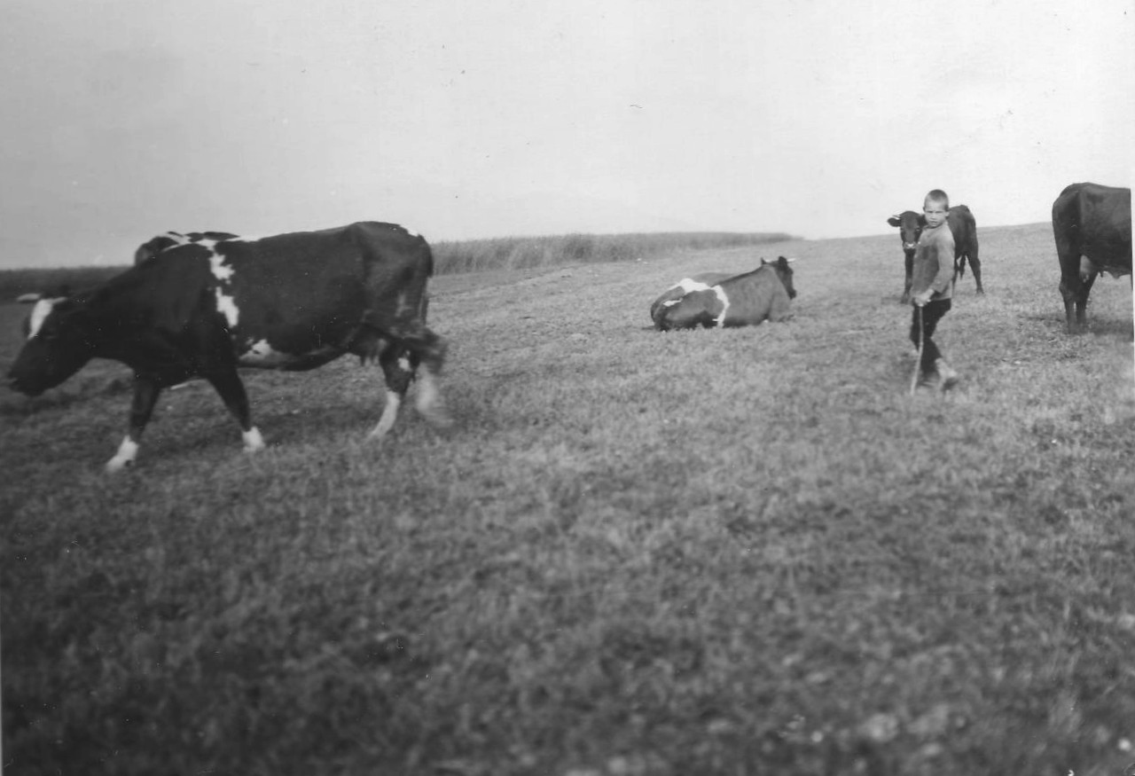 Junger Kuhhirte mit Kühen auf einer Weide bei Winterberg.